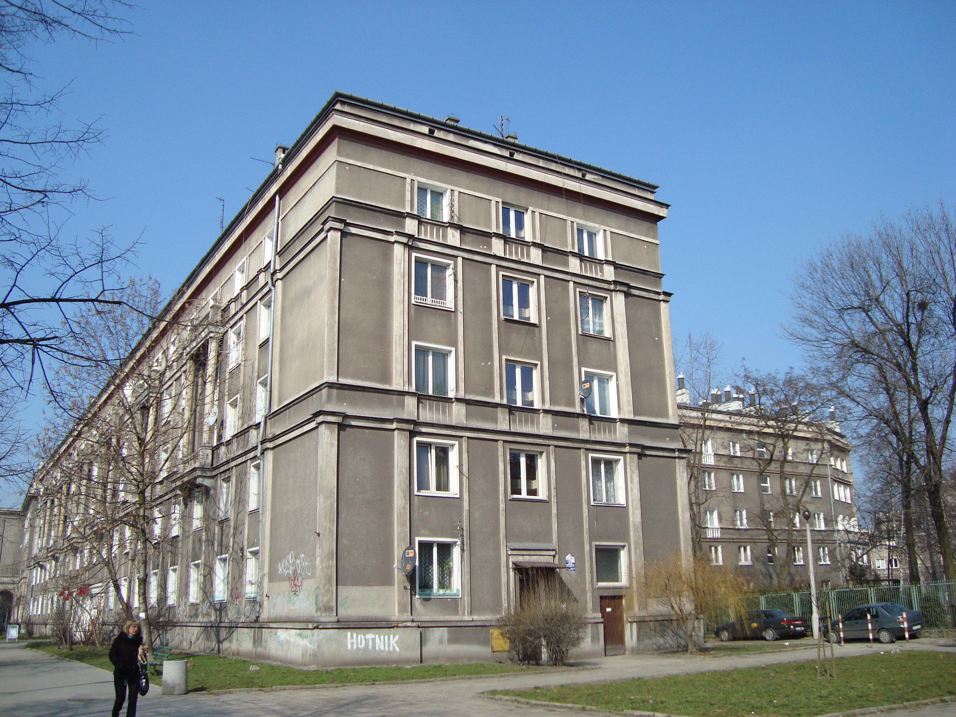 Osiedle Centrum A